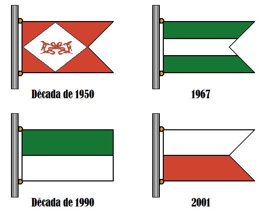 Bandeirolas das lanças da Policia Montada da Polícia Militar do Paraná.